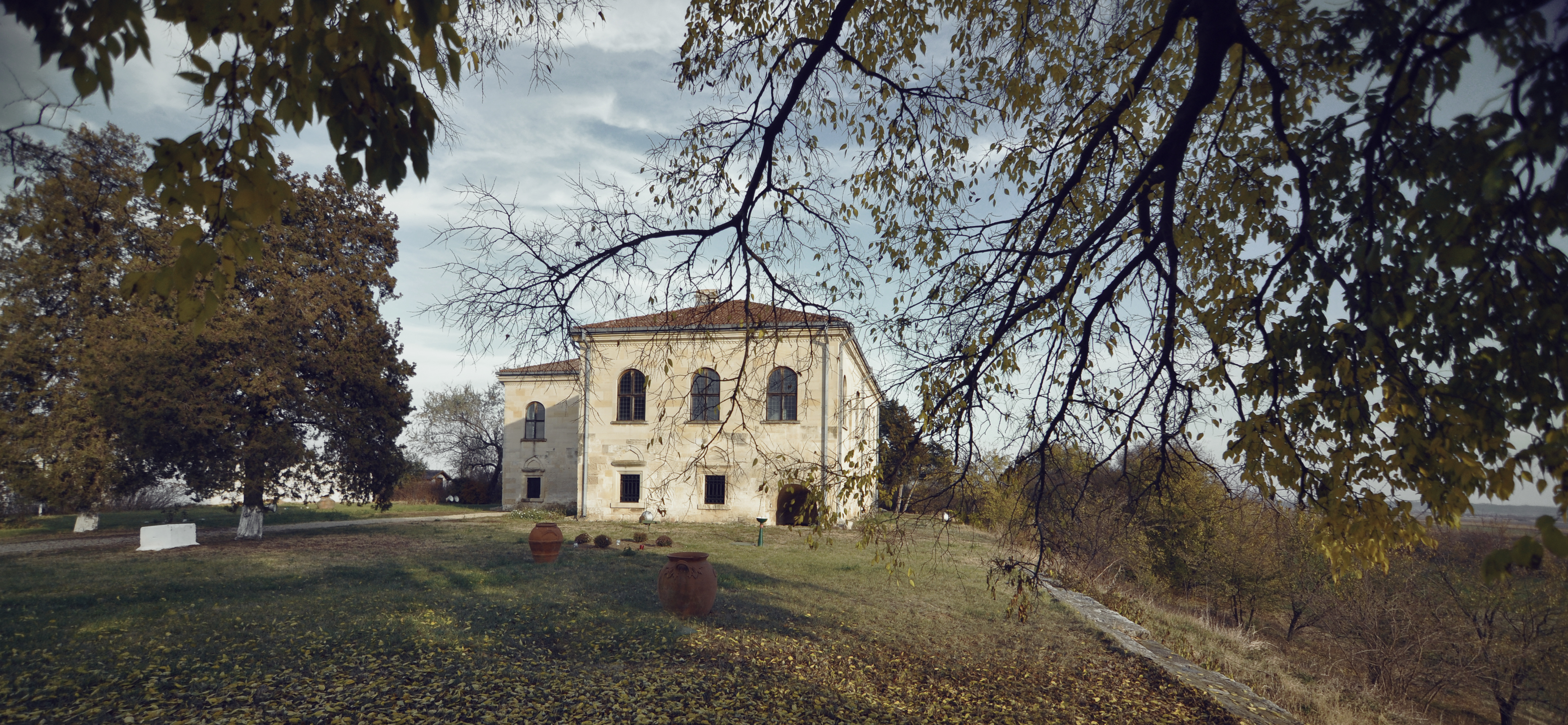 Heresti- The Stone House of Udriste Nasturel Casa de Piatră de la Hereşti a lui Udrişte Năsturel [Comuna Herăşti, judeţul Giurgiu] finished in 1642 [now belongs to The Romanian Peasant Museum and houses a permanent pottery exhibition] "singurul monument de arhitectura civila româneasca de la începutul secolului al XVII-lea construit în întregime, pe dinafara si pe dinauntru, din piatra de talie slefuita."